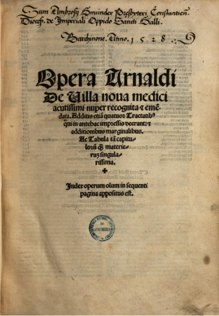 Arnaldus de Villa Nova, Opera (1527) title page